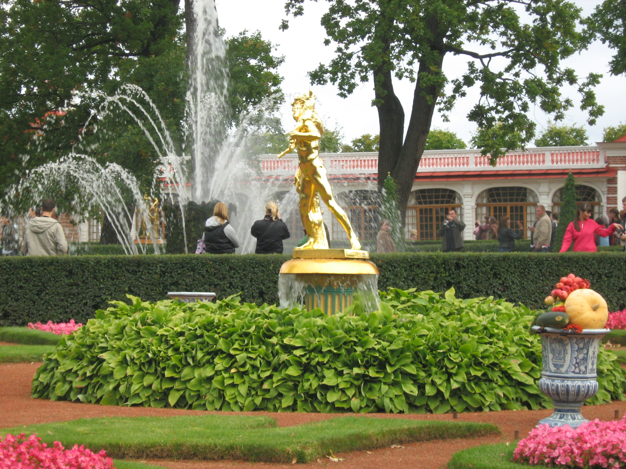 Peterhof - the garden "Monplezir"